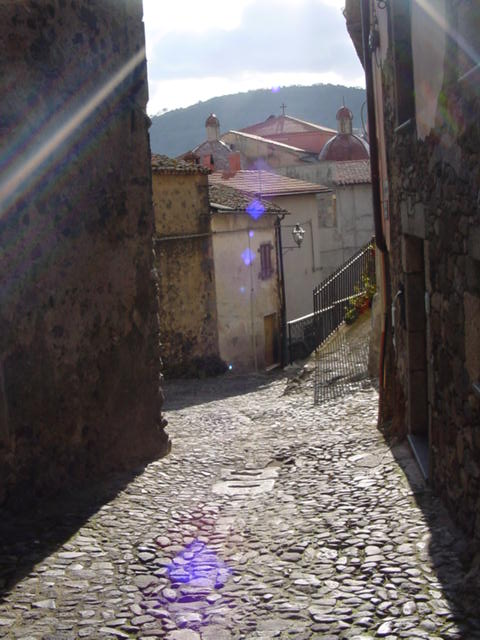 Veduta di Santu Lussurgiu